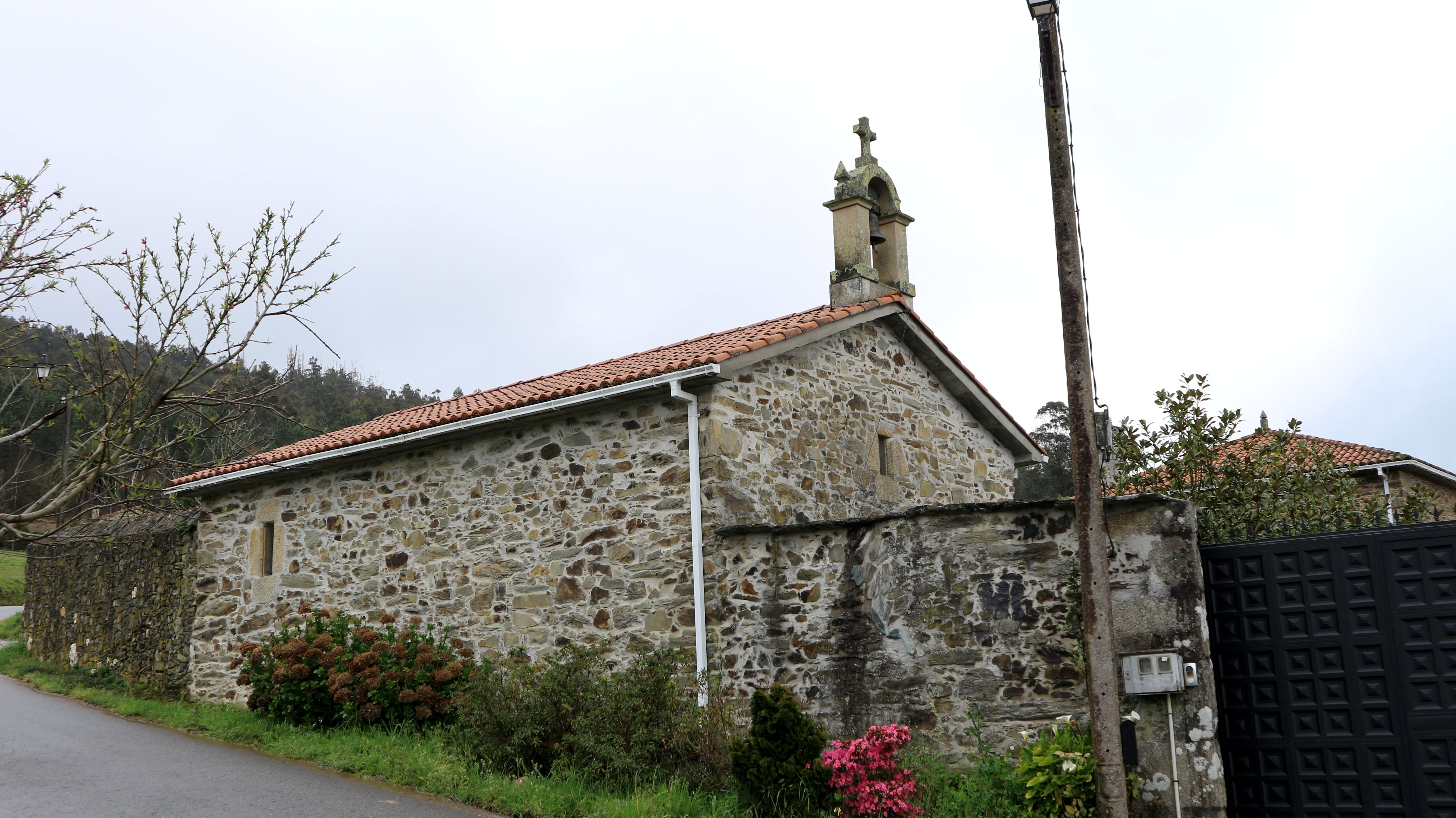 Capela do Pazo da Chán, na Chan, Vilacova, Abegondo.